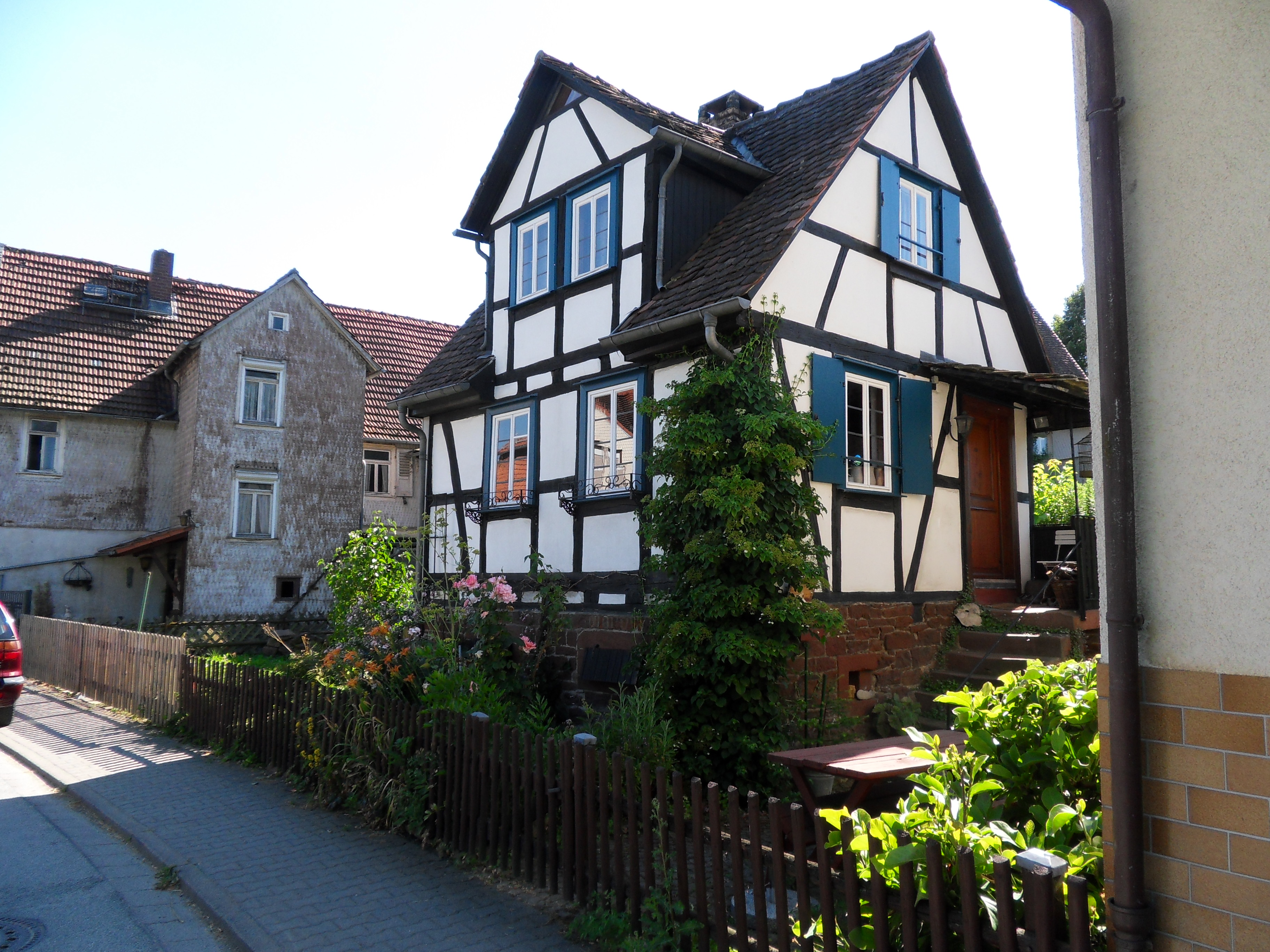 Denkmalgeschütztes Tagelöhnerhaus aus der ersten Hälfte des 19. Jahrhunderts in der Einhardstraße 108 in Steinbach bei Michelstadt, ein vorzüglich erhaltenes Kleinhaus in Fachwerkkonstruktion